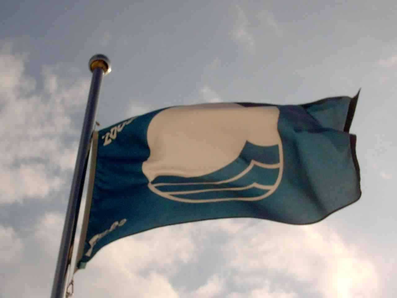 Blaue Fahne, Rovinj, 2005.